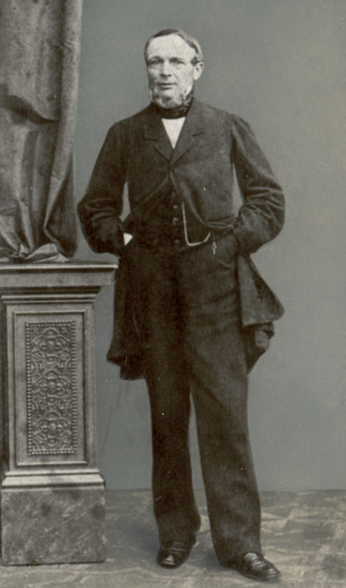 Bild von Albrecht Bergmann